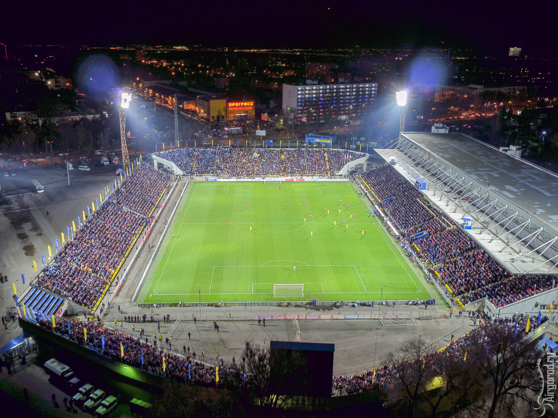 Ростовский стадион во время проведения матча ФК Ростов - ПФК ЦСКА. 2016